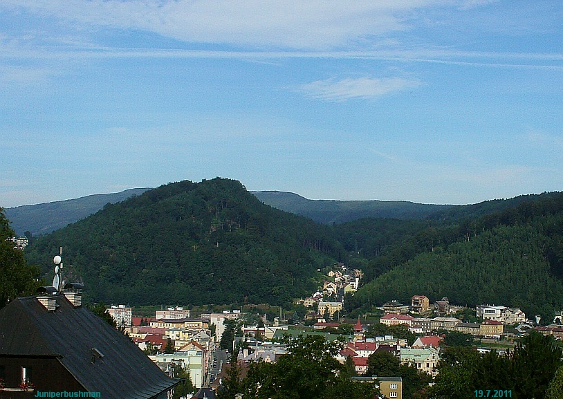 Pohled na Špičák od nemocnice